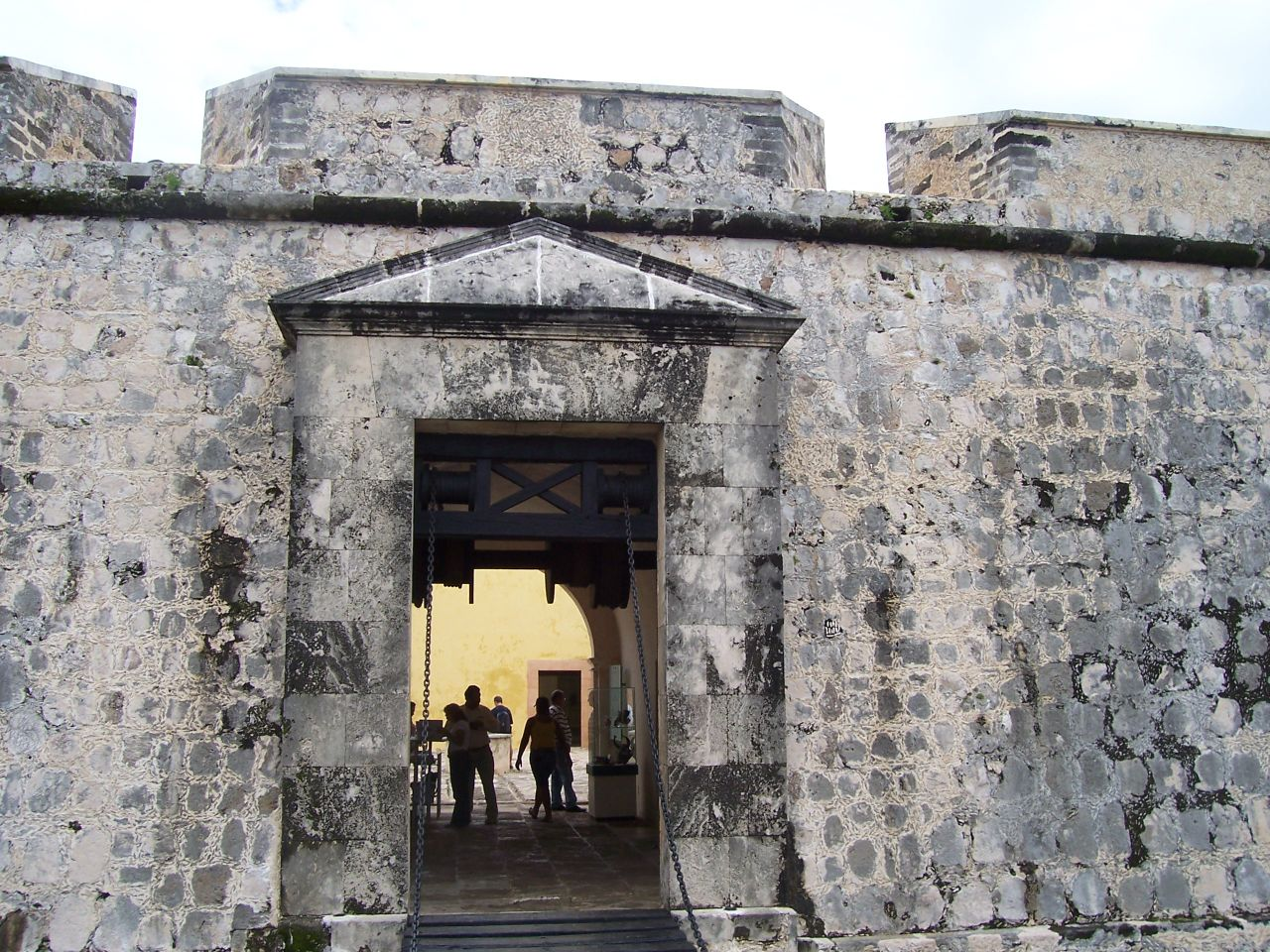 Fuerte de San Miguel; San Francisco de Campeche.